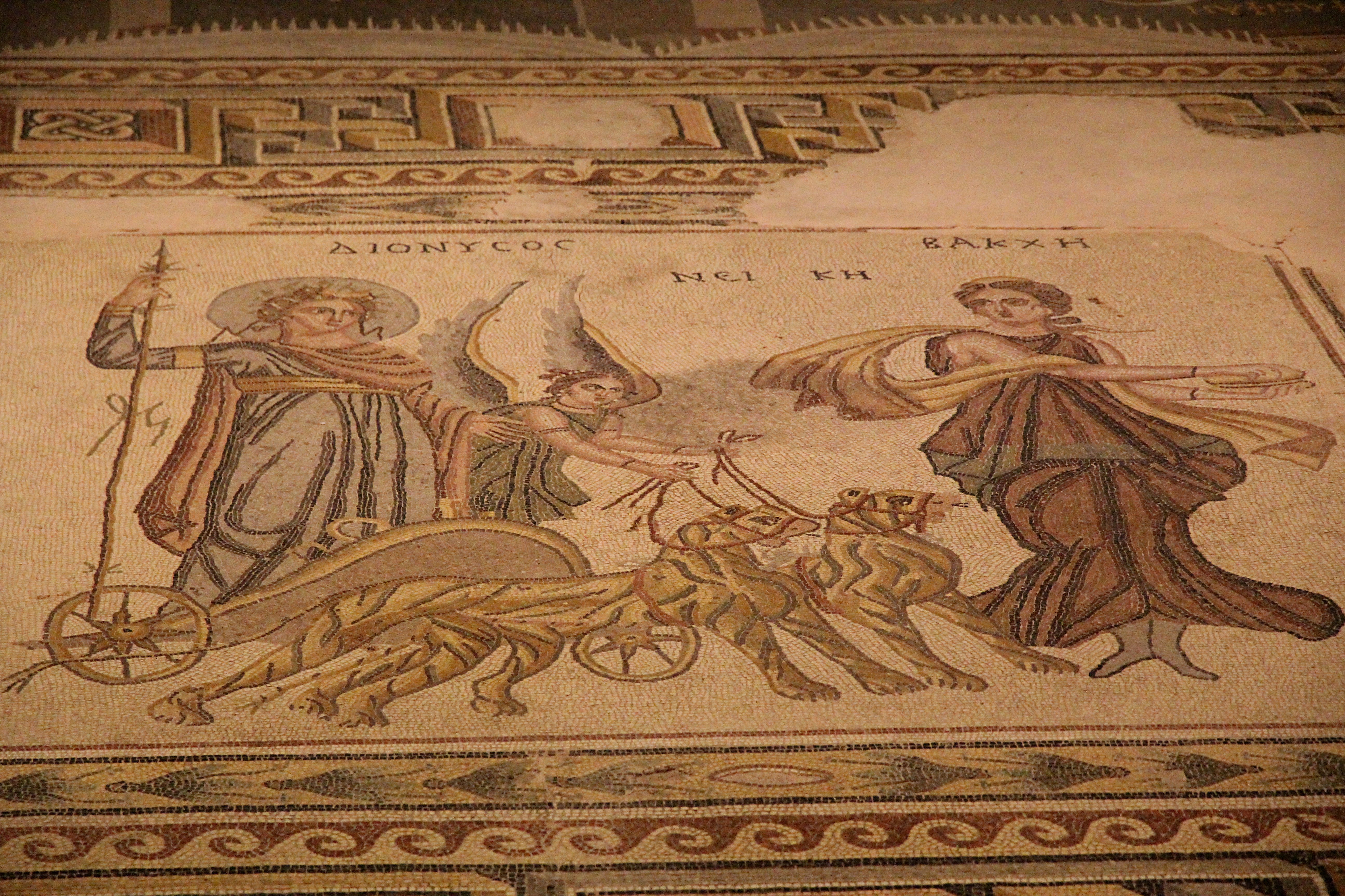 Zeugma-Mosaik-Museum, Gaziantep, Türkei, "Triumph des Dionysos", Dionysos, Nike und eine Bakche (Maenade), Mosaik aus dem "Haus des Poseidon" in Zeugma